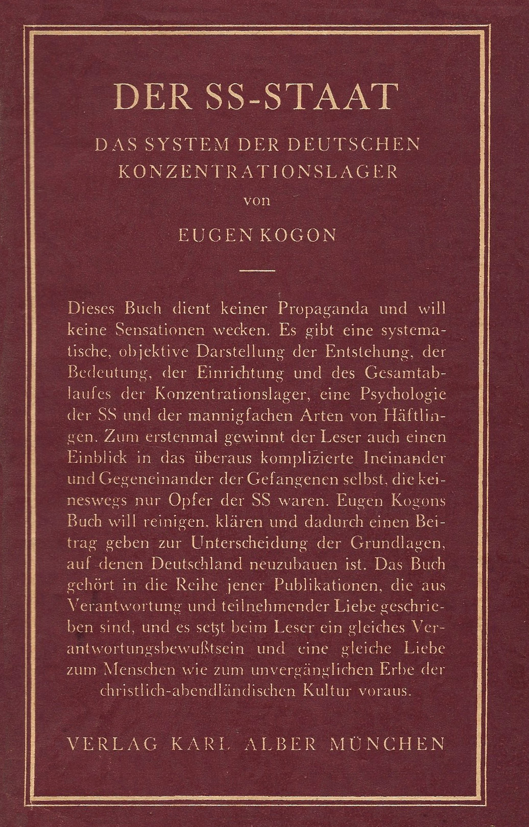 Eugen Kogon: Der SS-Staat. Umschlag der 1. Auflage 1946. Verlag Karl Alber, München